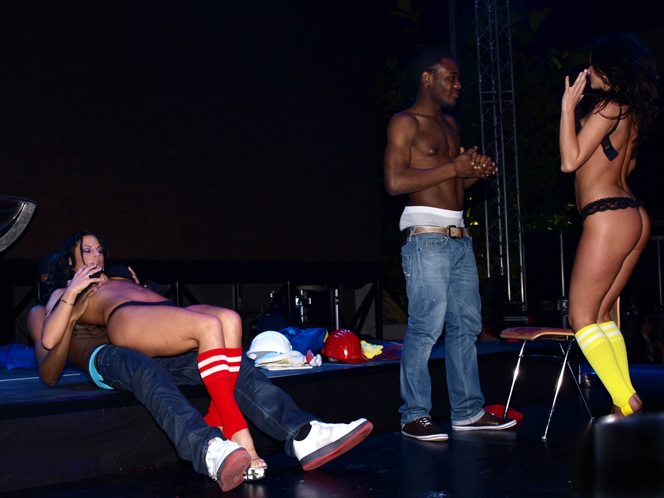 ErosPyramide20090221_421